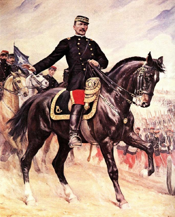 Manuel Jesús Baquedano González (Santiago; 1 de enero de 1823 - † 30 de septiembre de 1897), fue un militar y presidente chileno, comandante en jefe del Ejército durante la Guerra del Pacífico.